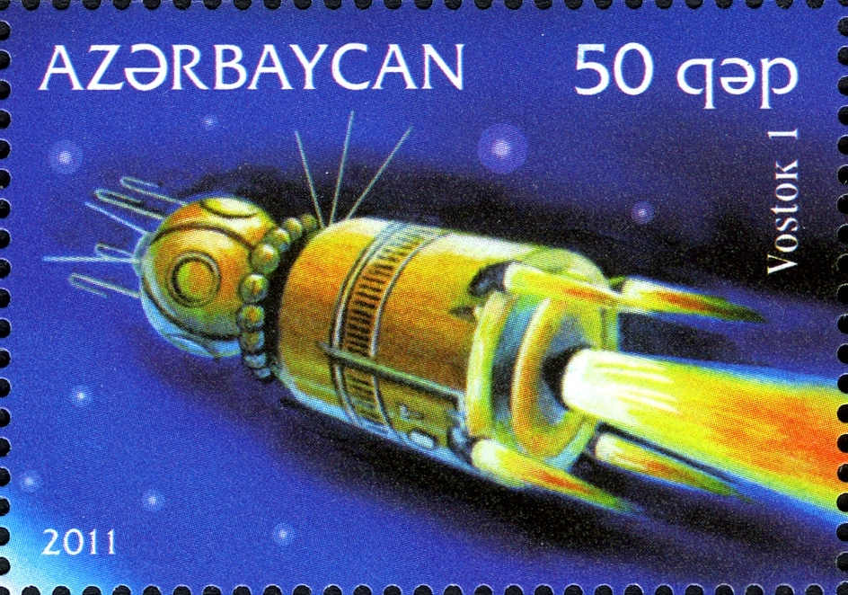 İnsanın kosmasa ilk uçuşunun 50 illiyi.